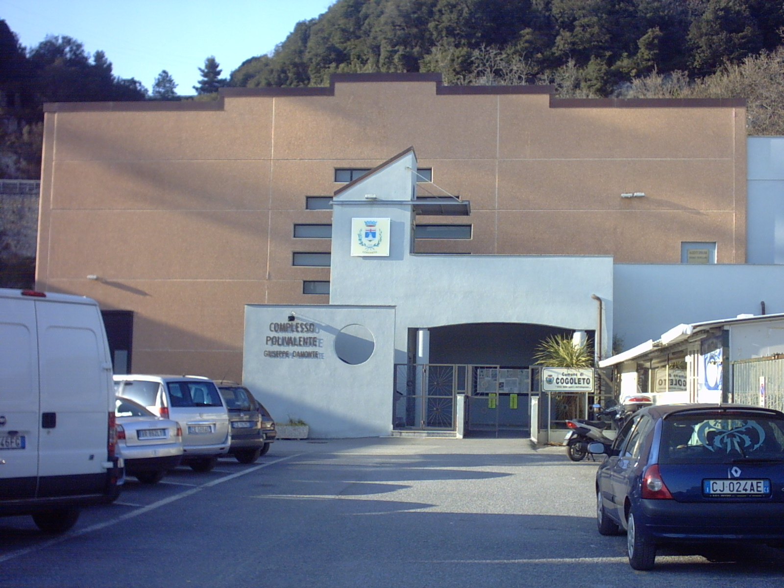 Complesso polivalente "Giuseppe Damonte" di Cogoleto (Genova)